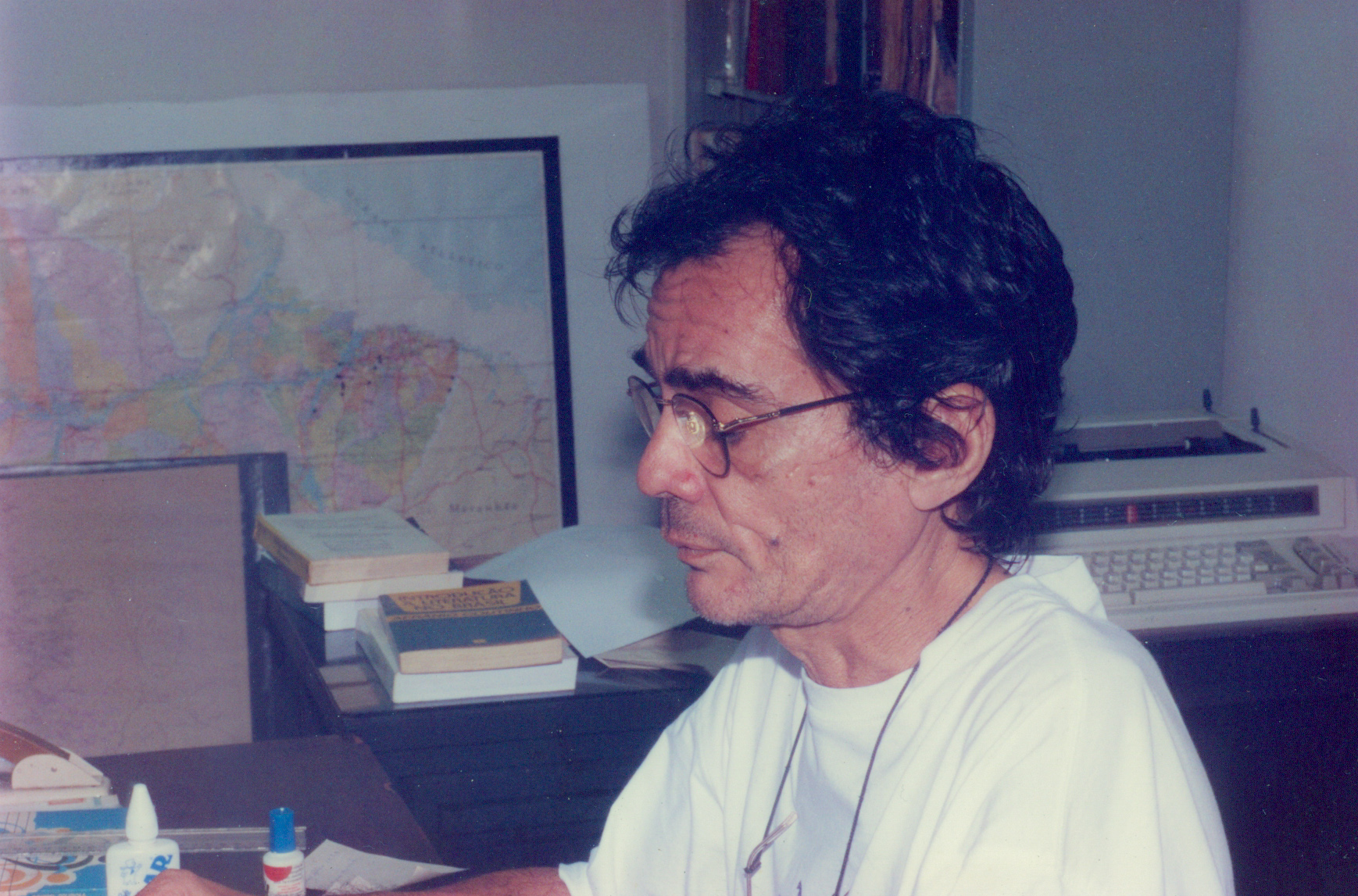 O escritor Arthur Bogéa a trabalhar nos anos de 1990